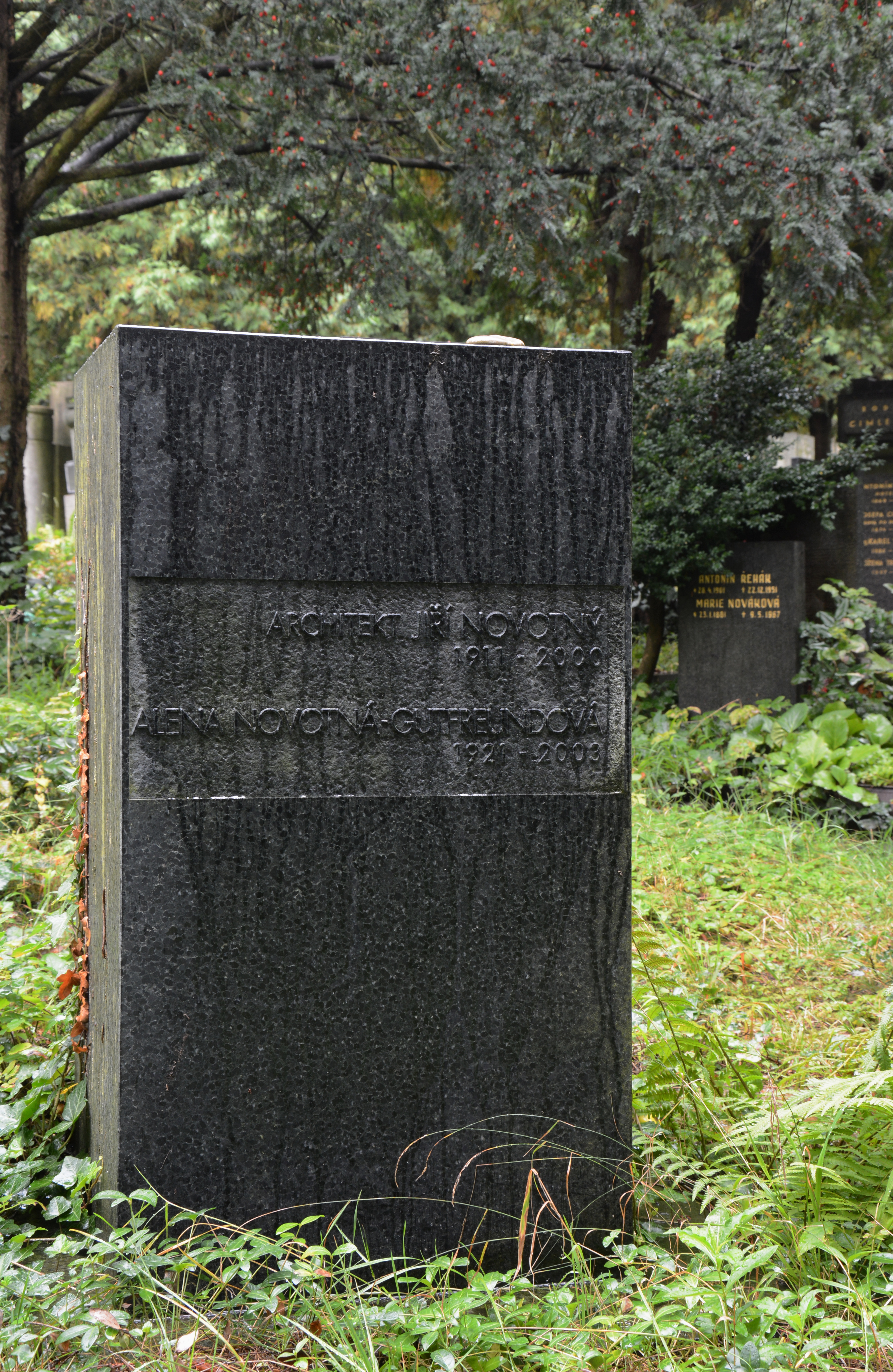 Tomáš Novotný: Hrob architekta Jiřího Novotného a Aleny Novotné-Gutfreundové.